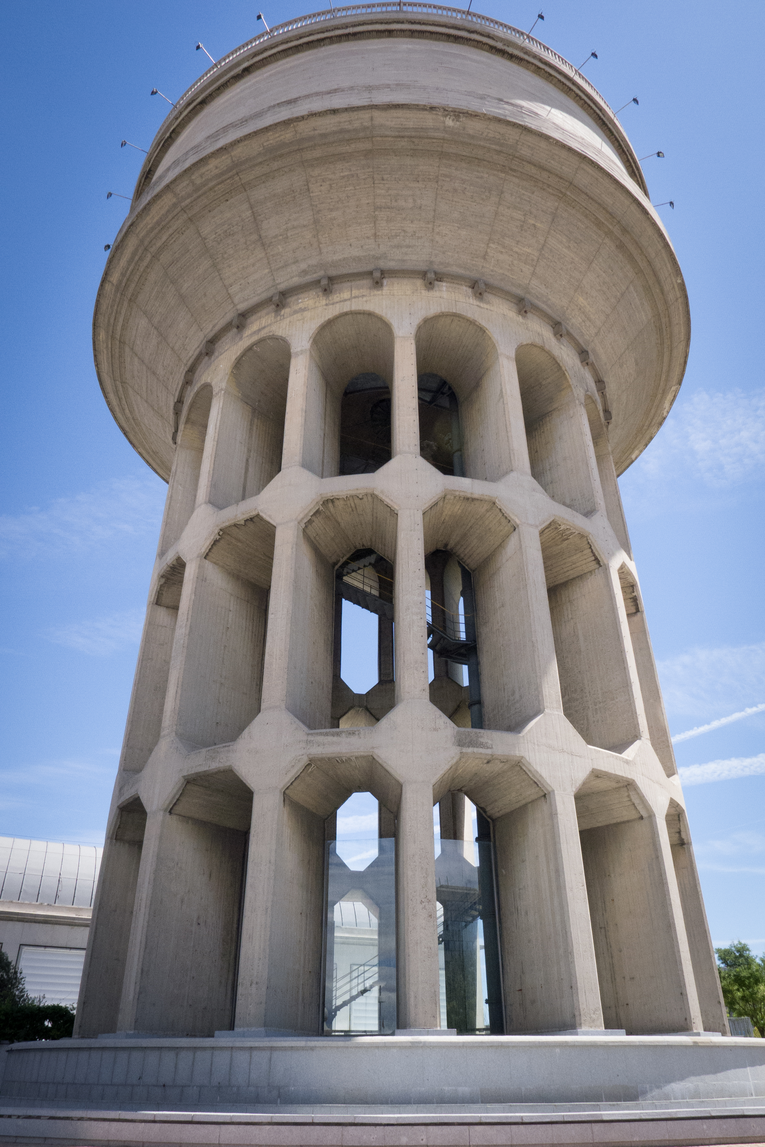 Depósito de agua del Canal de Isabel II en la plaza de Castilla.